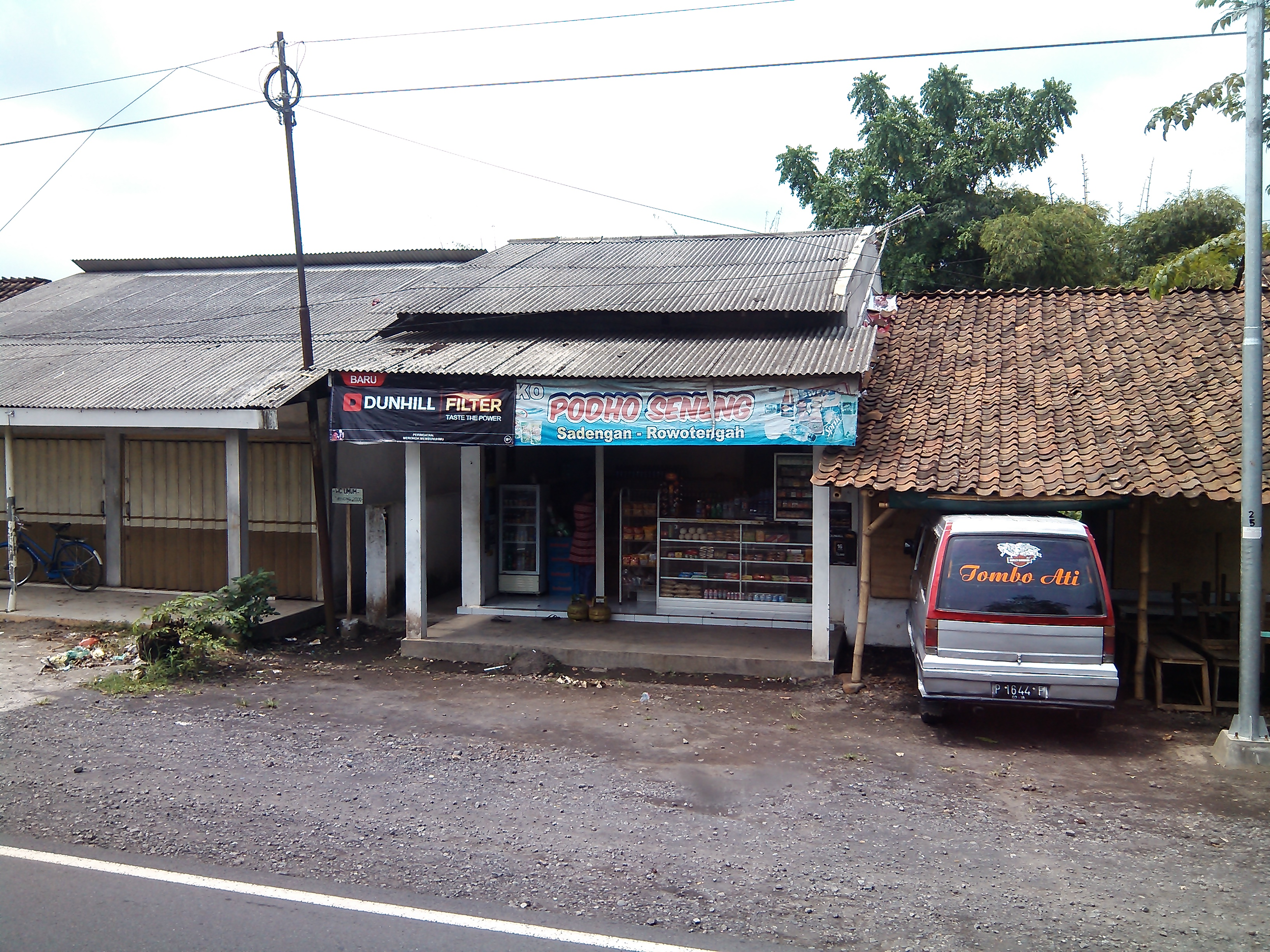 Toko Podho Seneng, Sadengan, Rowotengah, Sumberbaru, Jember